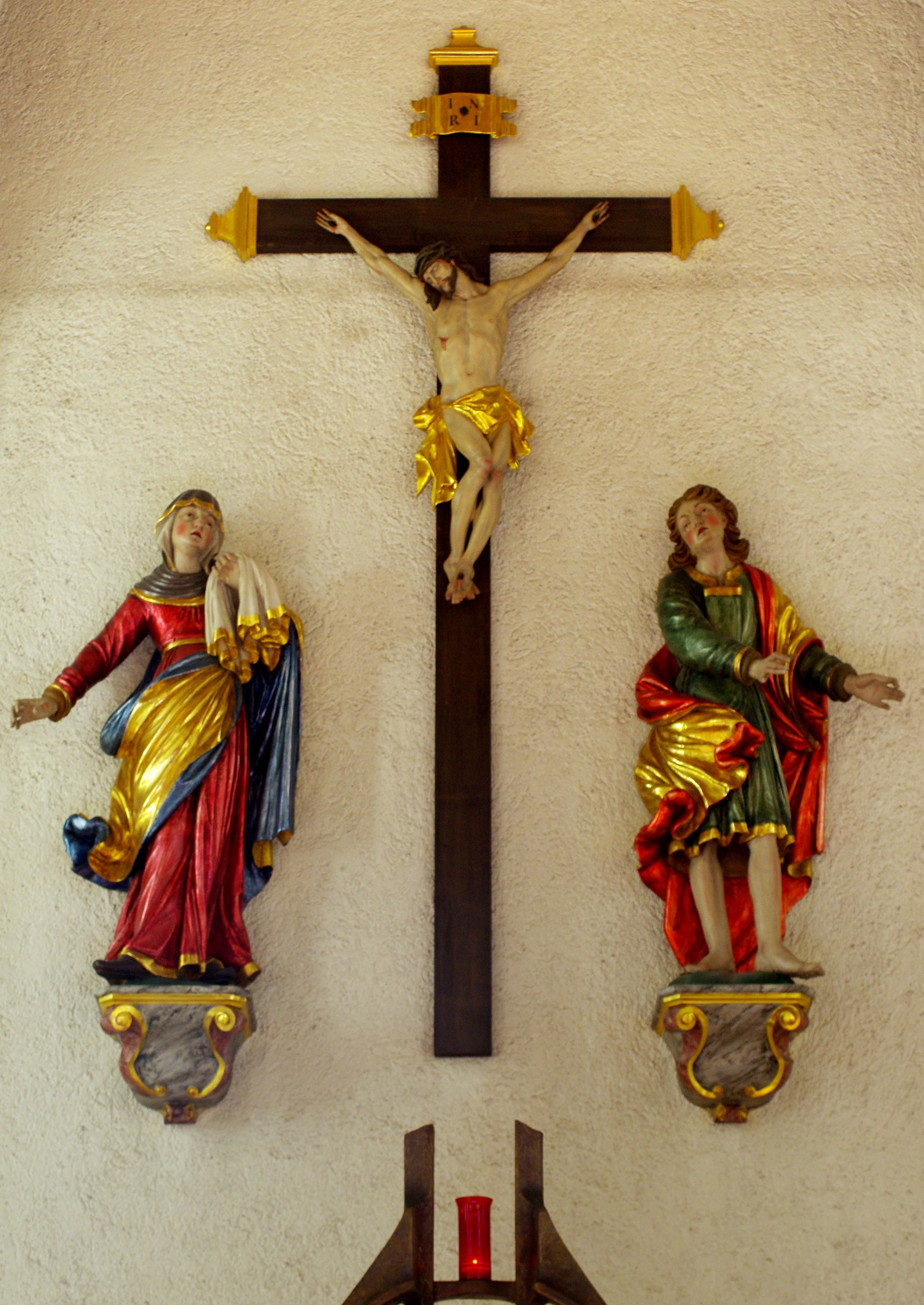 Die Pfarrkirche St. Martin in Vöhrenbach